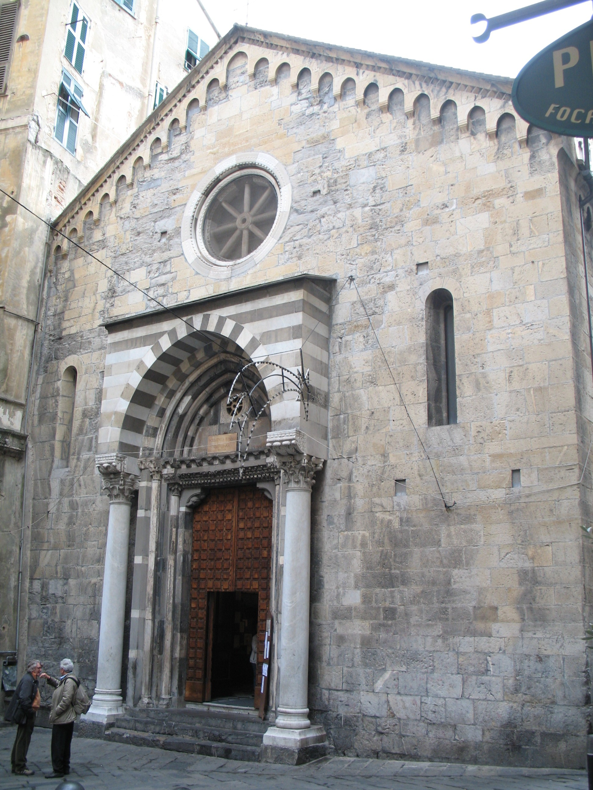 Immagine da Genova